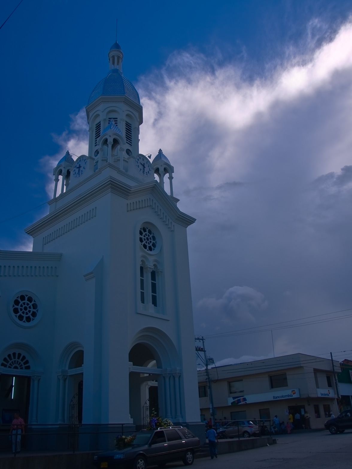 Iglesia en La Unión, Valle del Cauca, Colombia